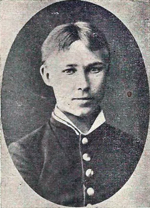 Іван Липа — гімназист першого класу